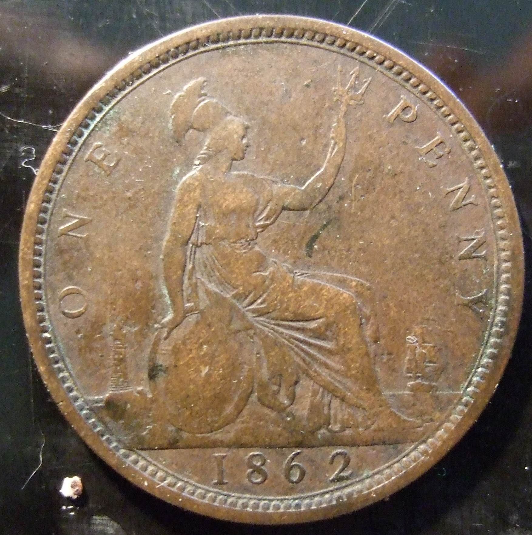 GREAT BRITAIN, VICTORIA 1862 ---PENNY a